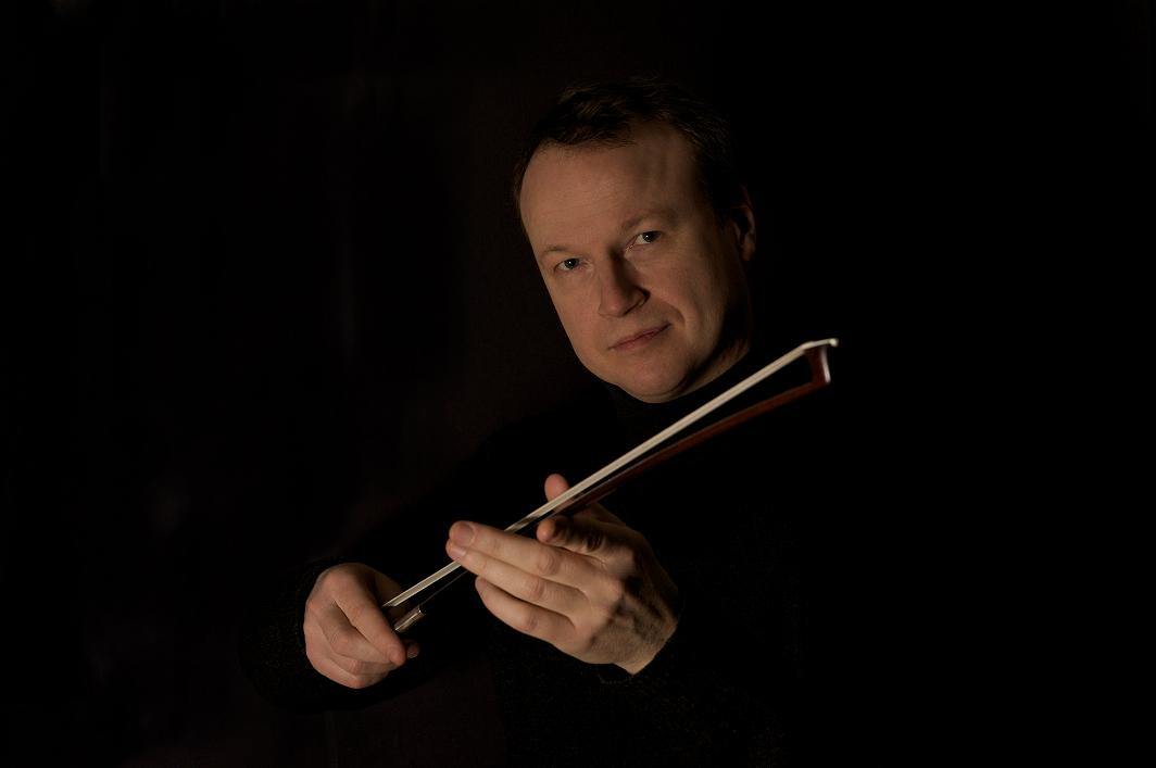 Pierre Lenert